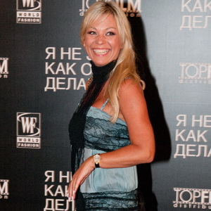 На вечере в гостинице Ритц Карлтон 28 августа 2011 года